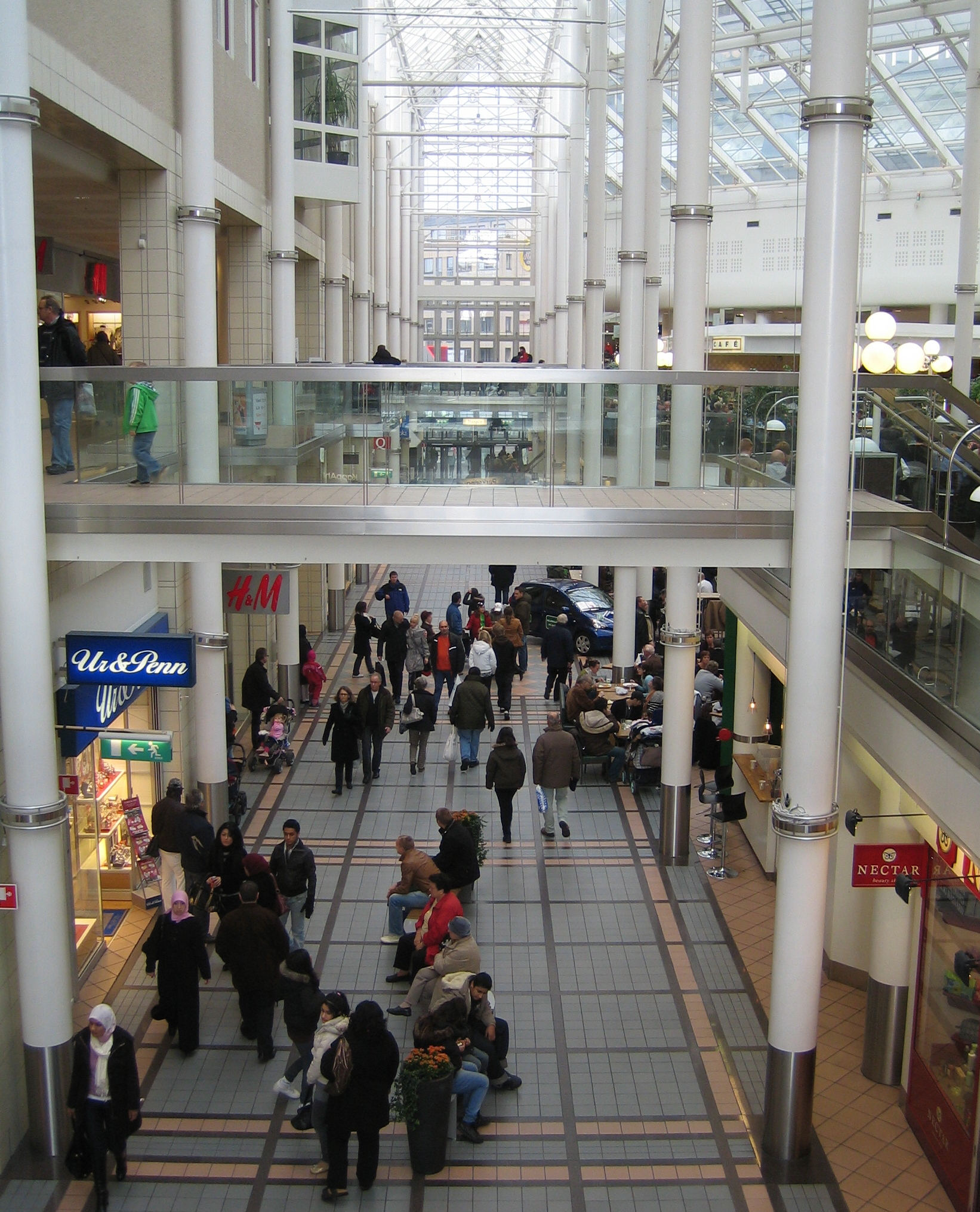 Triangeln shopping mall in Malmö, Sweden